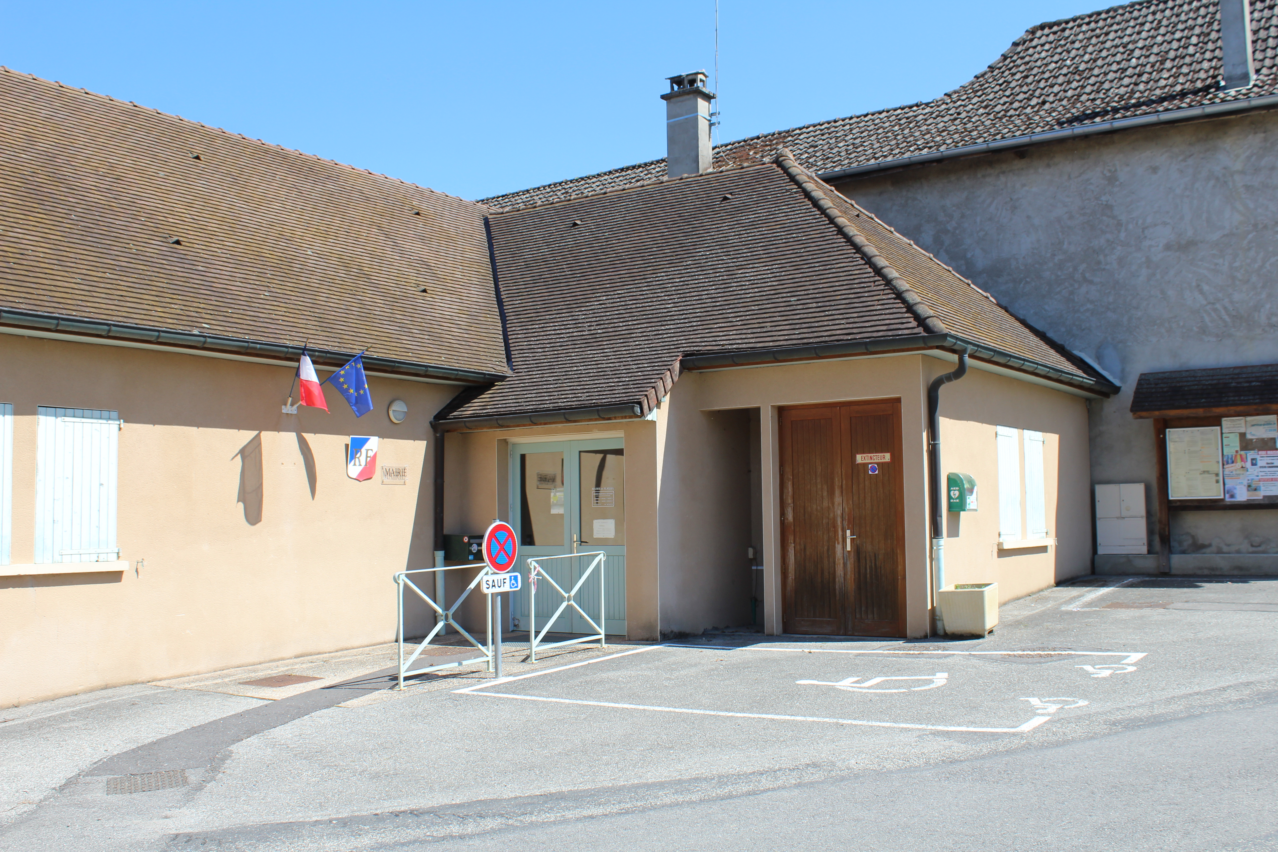 Mairie de Flaxieu.